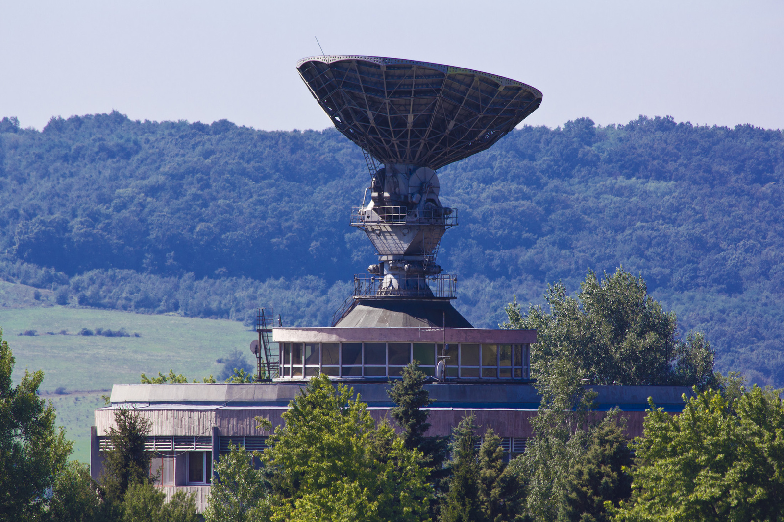 Űrtávközlési Földi Állomás (Taliándörögd, )